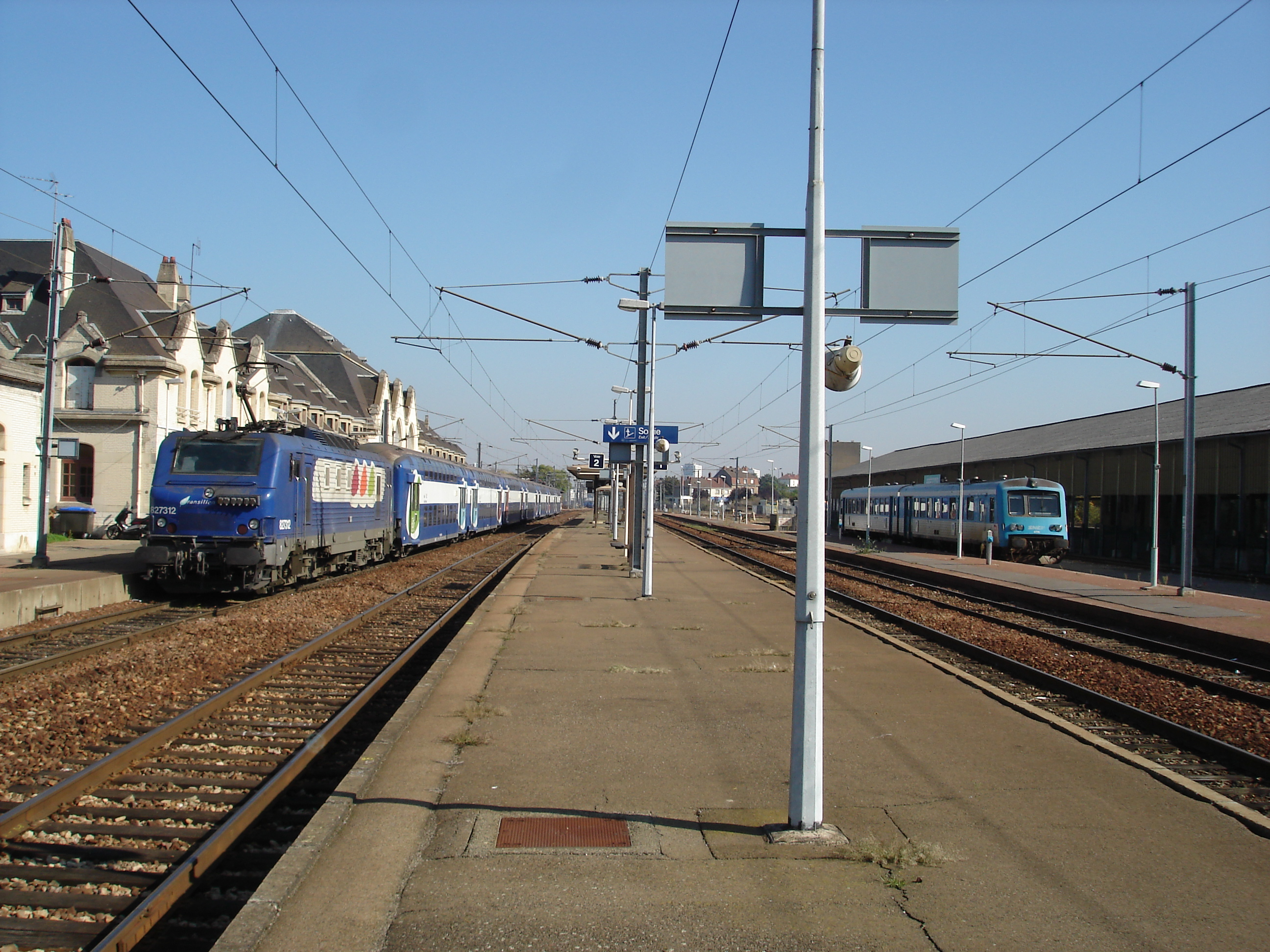 Gare de Dreux (28) : Le quai central, l'autorail TER Basse-Normandie X 4750 et le train Transilien N (BB 27312 et VB 2N).